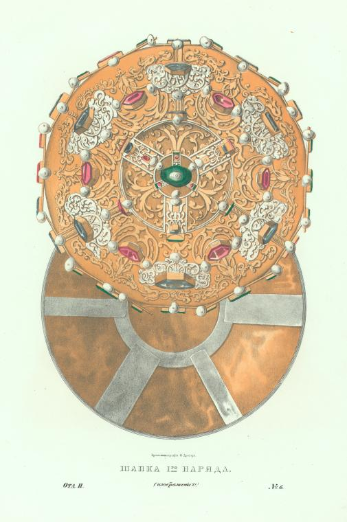 Астраханская шапка